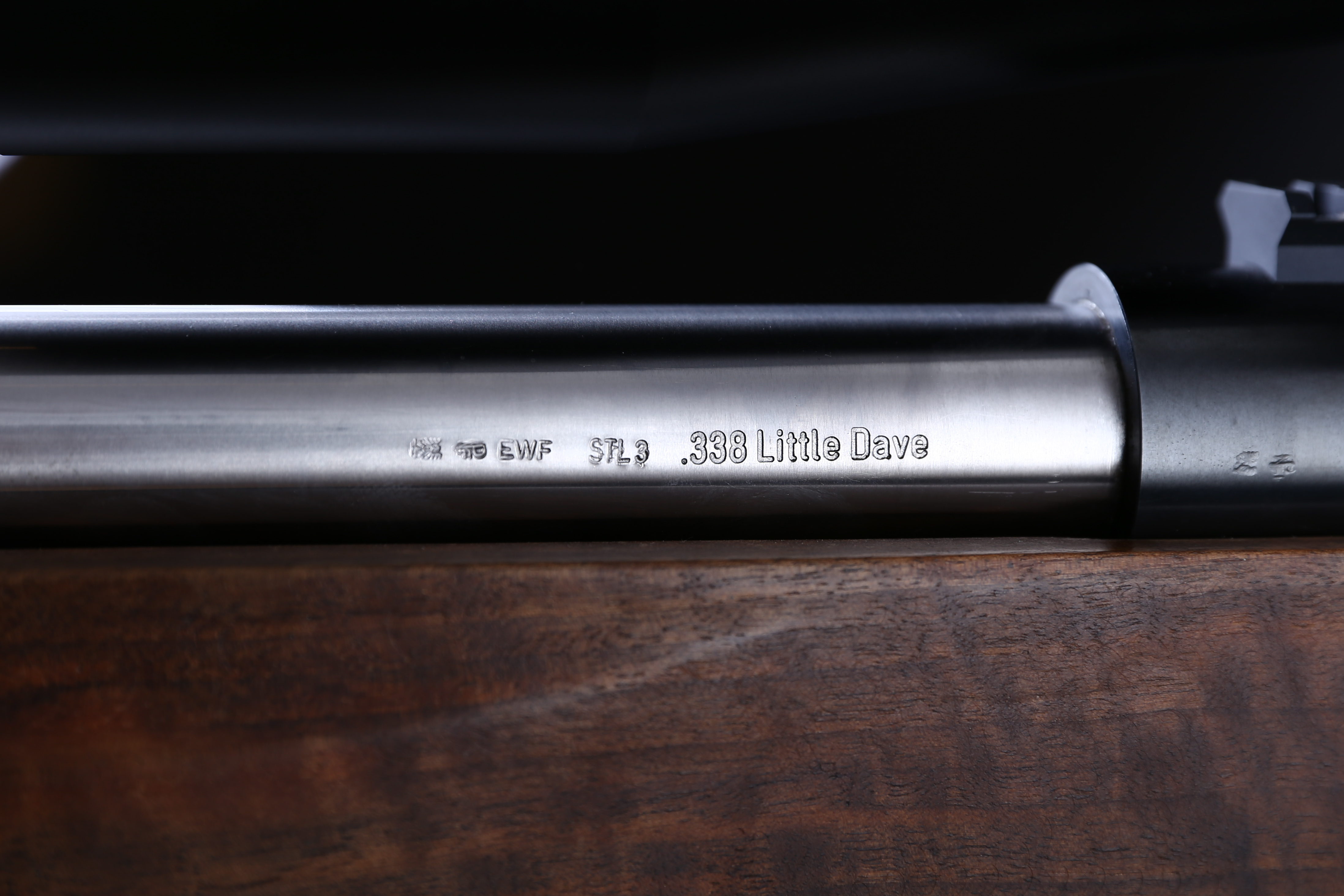 Beschusszeichen/Stempel